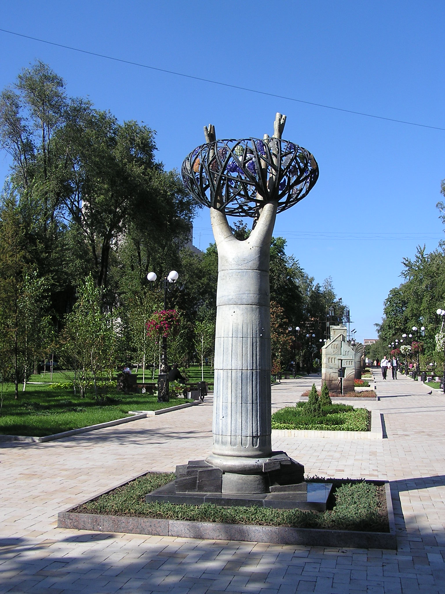 Донецк. Бульвар Пушкина.